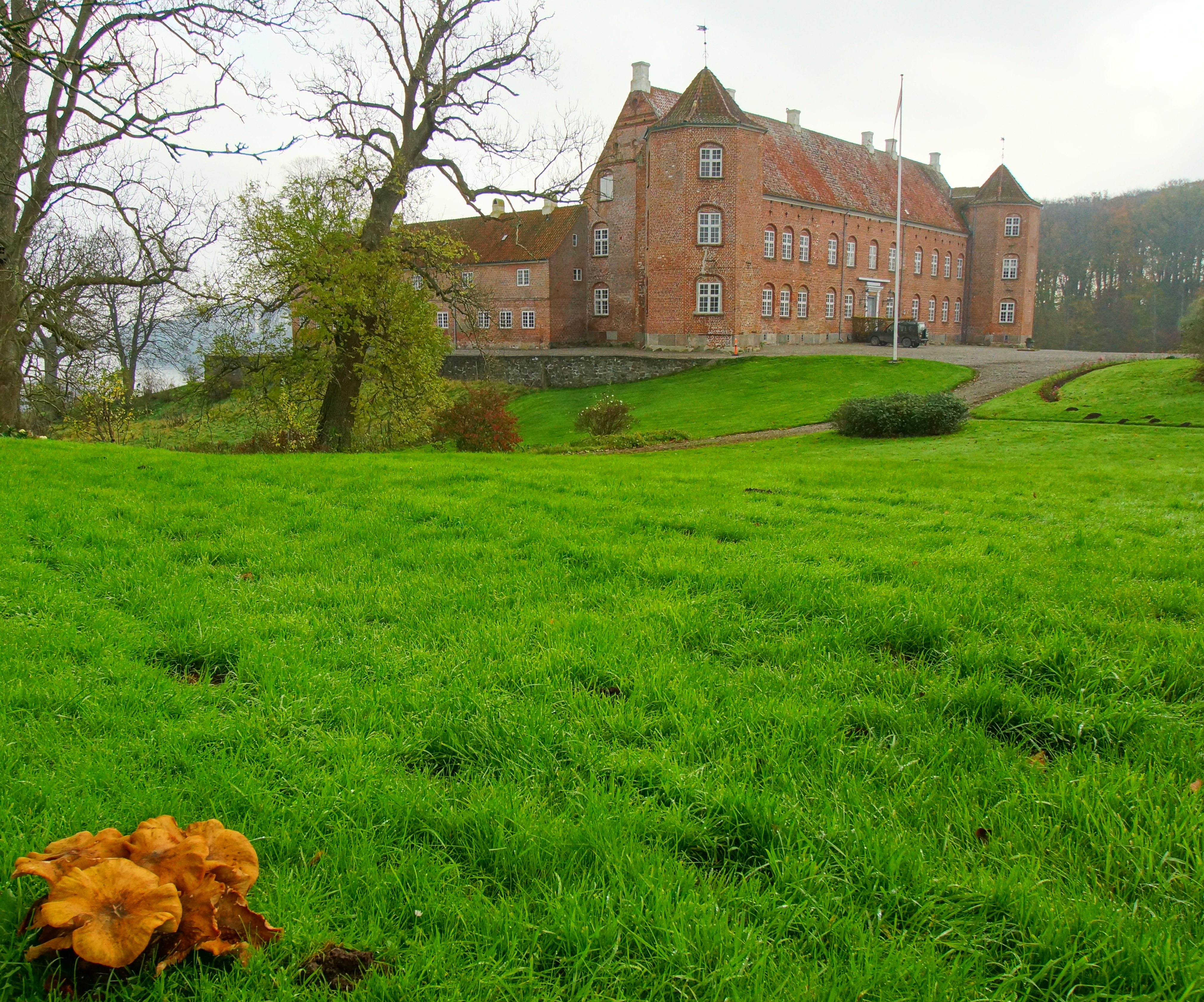 Rugård Slot fra nord 9